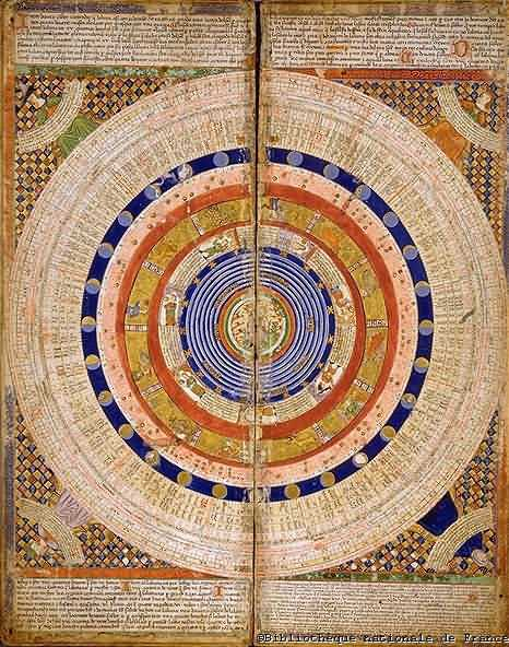 Calendari de l'Atles Català, Taula 2.